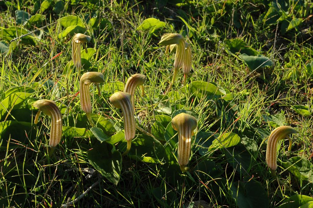 Arisarum vulgare in Azores.